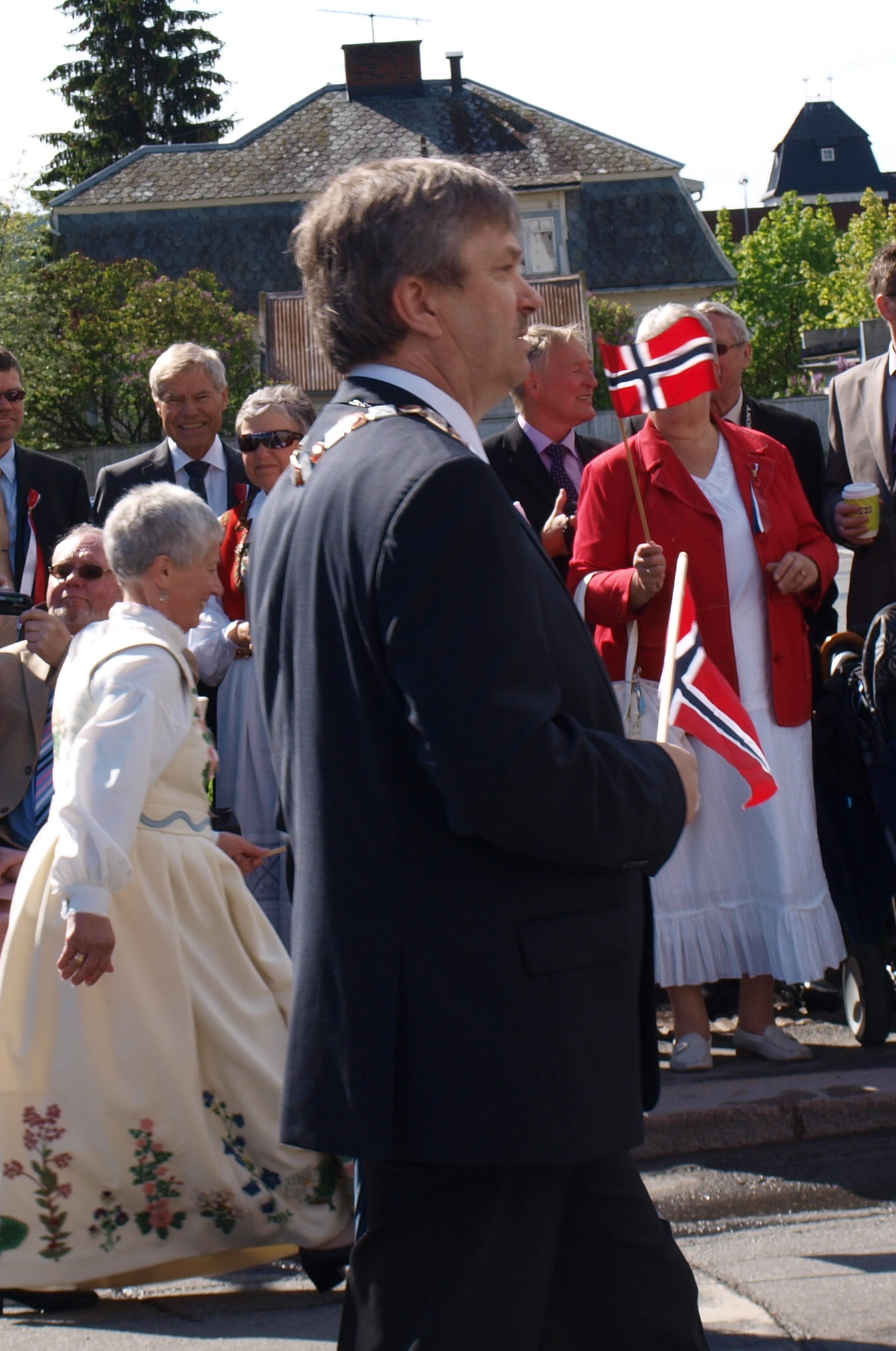 Kjell B. Hansen (f. 1957), norsk politiker som representerer Arbeiderpartiet. Bilde tatt 17. mai 2011.